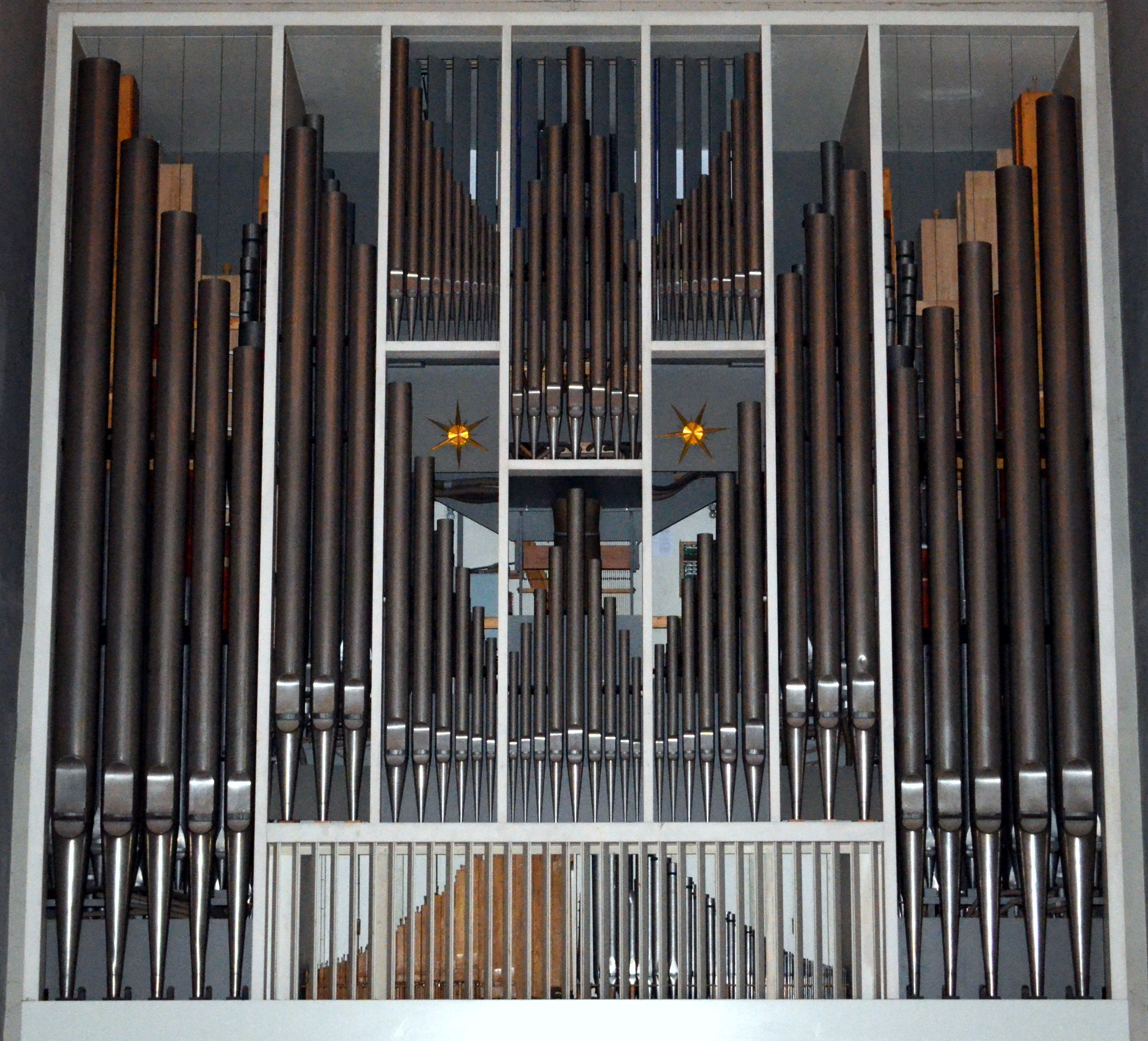 Braunschweig, Braunschweiger Dom: Orgel von Karl Schuke Berliner Orgelbauwerkstatt.